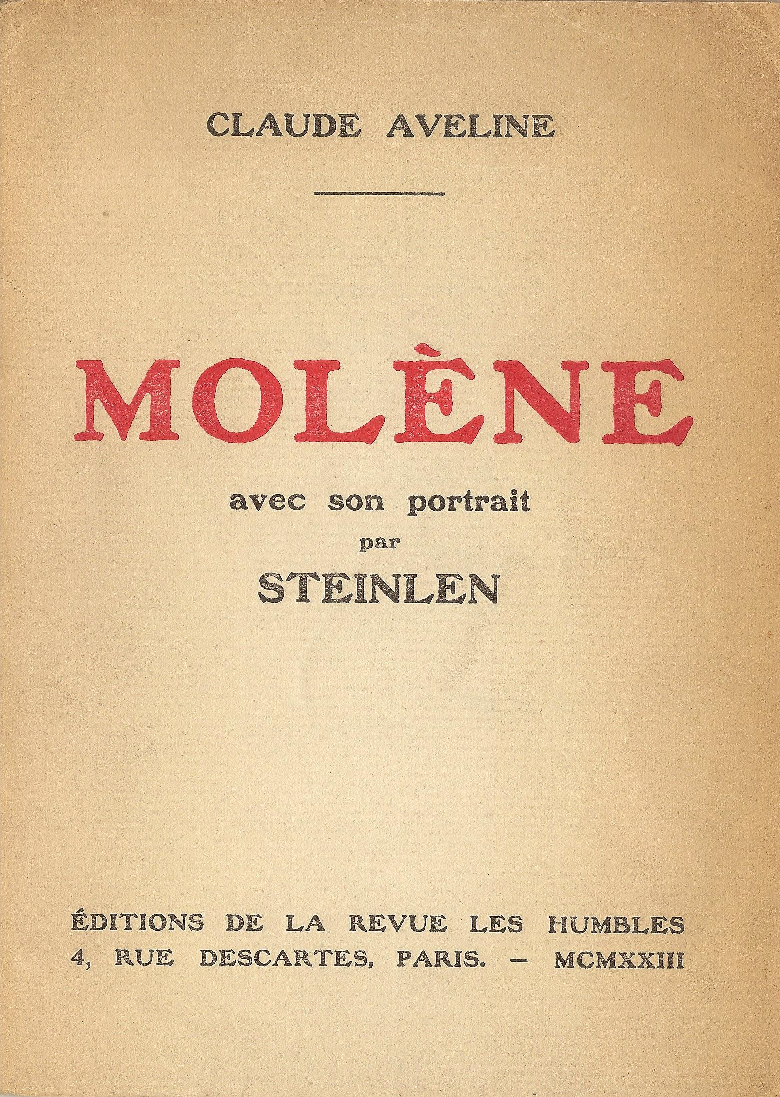 Couverture de "Molène" de Claude Aveline, 1922